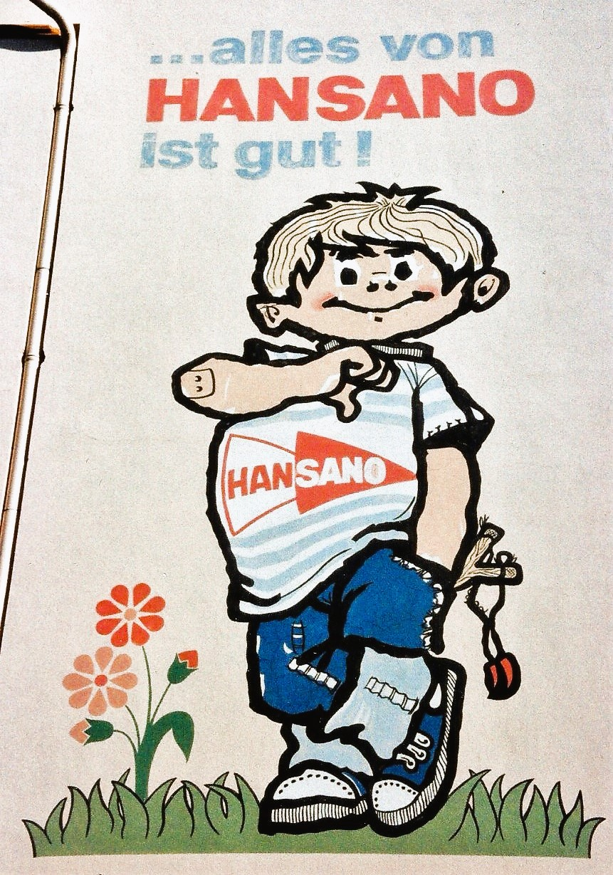 Hansi an einer Hauswand in der Fackenburger Allee. Nachdem der Dachstuhl des Hauses 2010 ausbrannte wurde dieser Hansi übermalt.